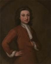 portrait de L'explorateur Philip Carteret